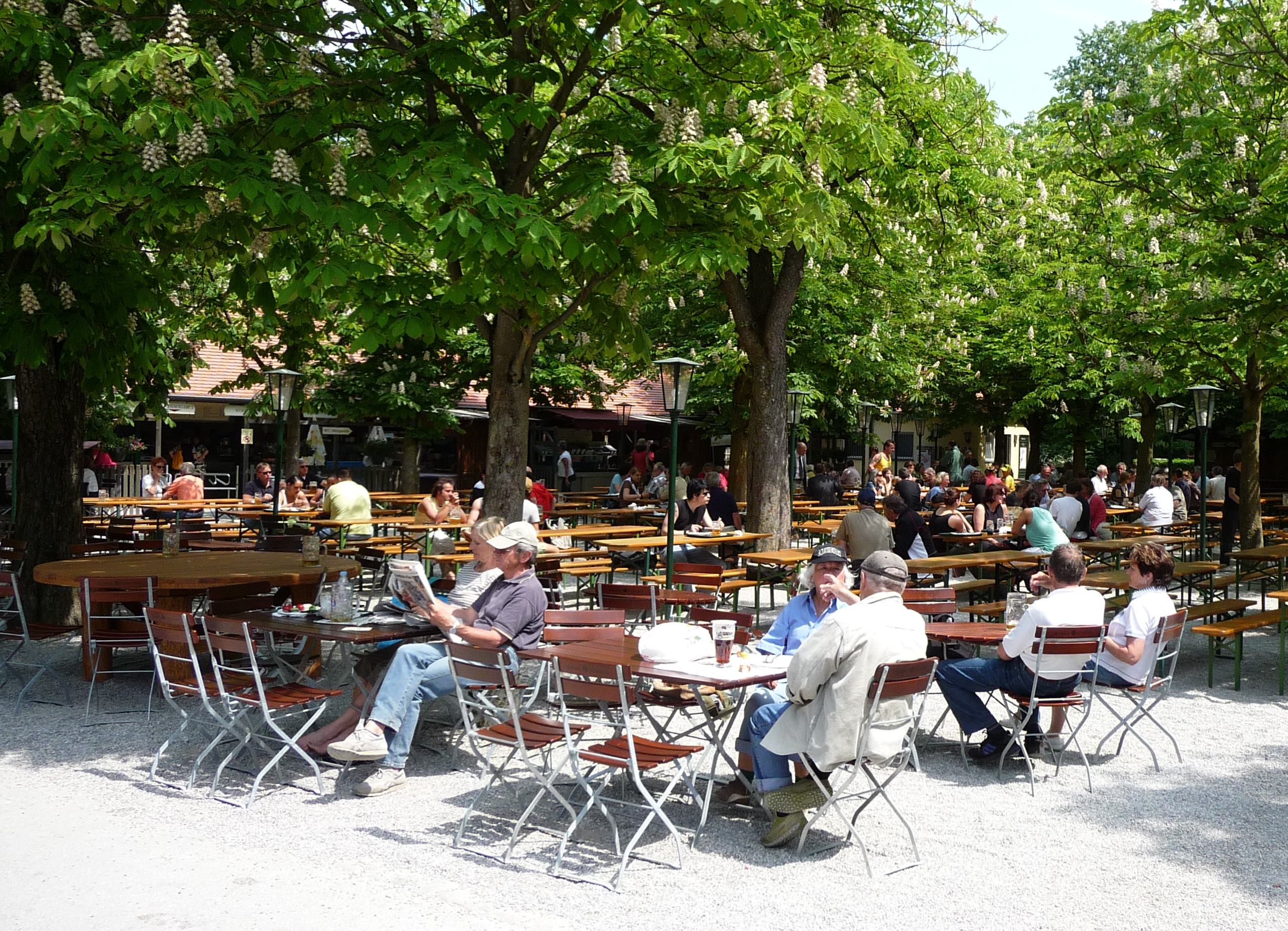 Aumeister Beergarden, in northern Munich, Germany.